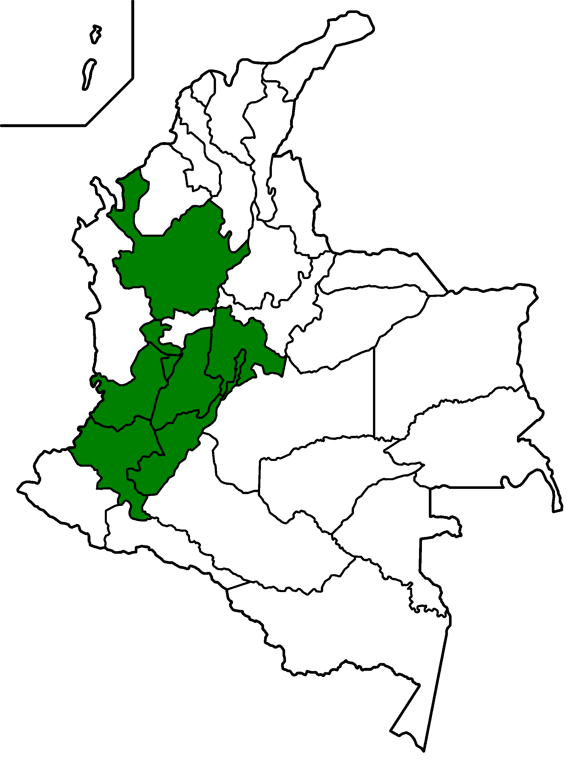 Departamentos de Colombia donde ha occurido el Congreso Colombiano de Esperanto